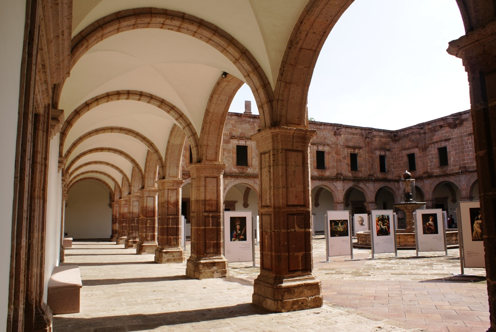 El Centro Cultural Clavijero se ubica en la ciudad de Morelia, Michoacán, México, es un centro cultural público dedicado albergar exposiciones temporales de instituciones culturales públicas y privadas. El recinto tiene su sede en lo que fue el antiguo Colegio de la Compañía de Jesús, de estilo barroco del siglo XVIII.